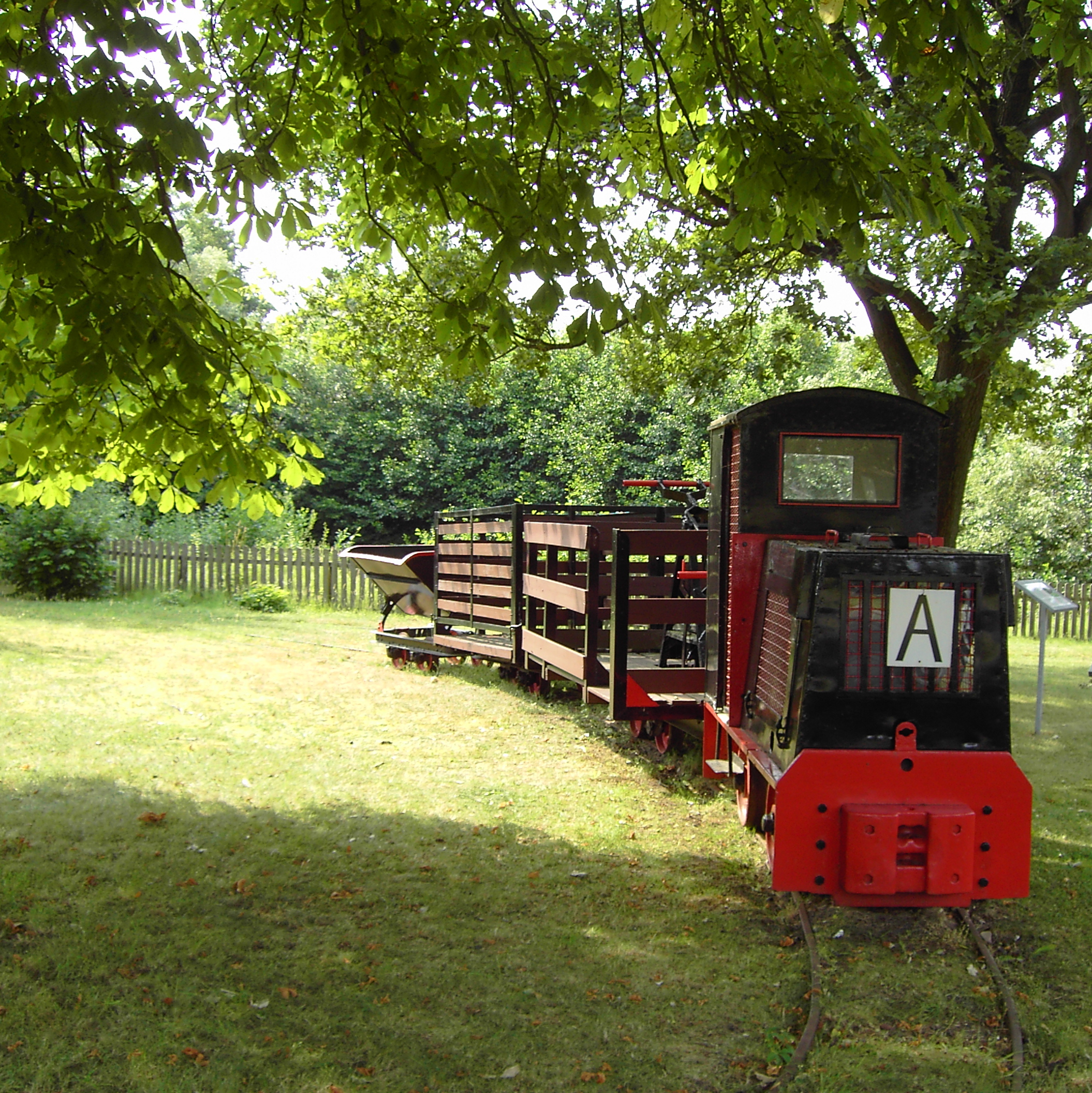 Freistatt-Torfbahn (Ausstellung-Schmalspurbahn) im Jahr 2008